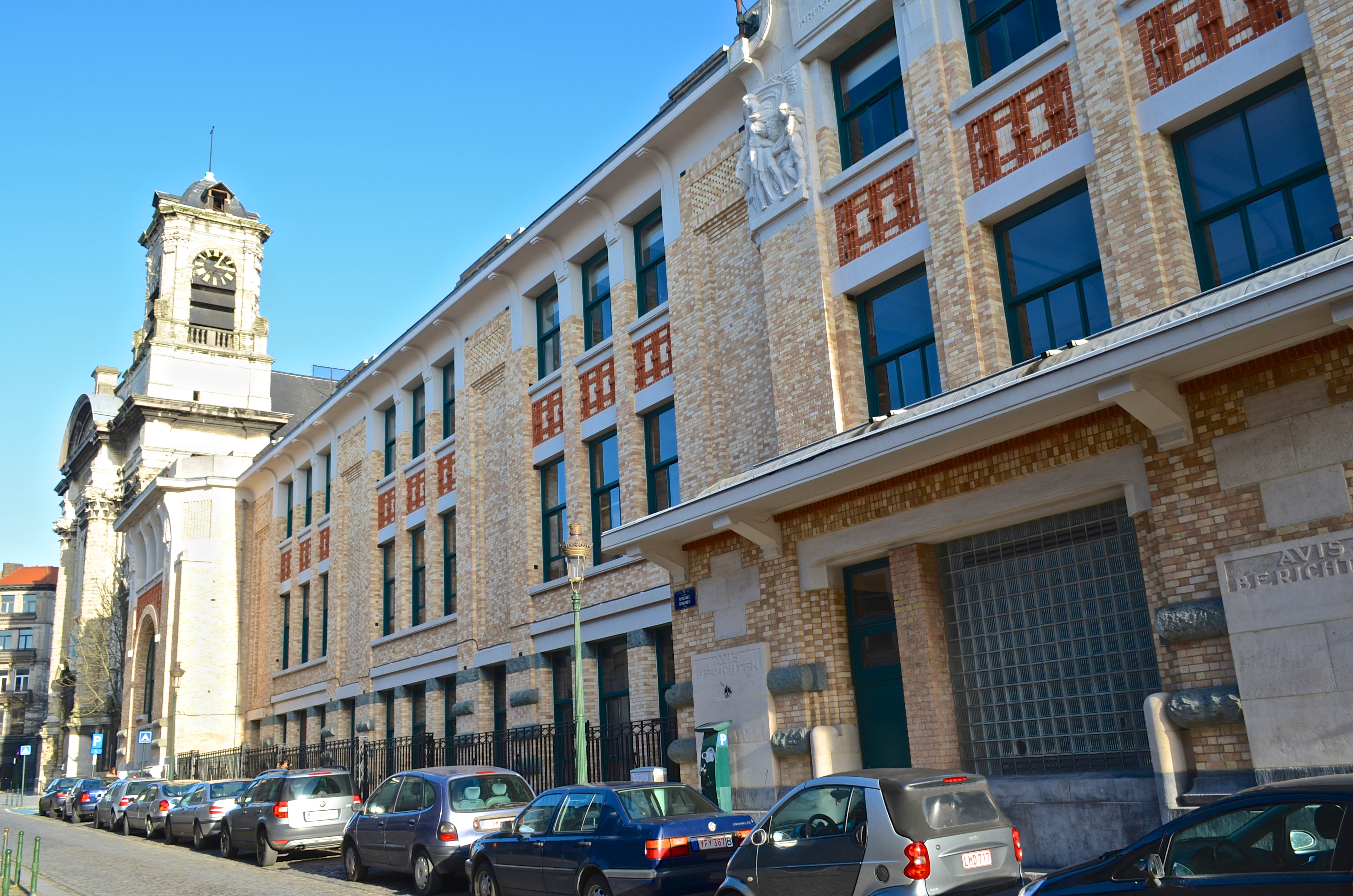 Bruxelles, Athénée Robert-Catteau, architecte François Malfait, et l’église des Minimes